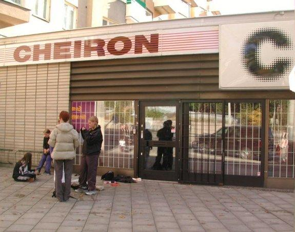 Cheiron studios - Fridhemsplan, Kungsholmen (hösten 2000)